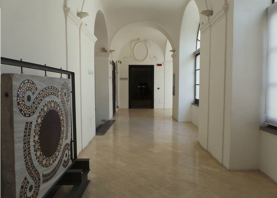 Sezione lapidi museo diocesano